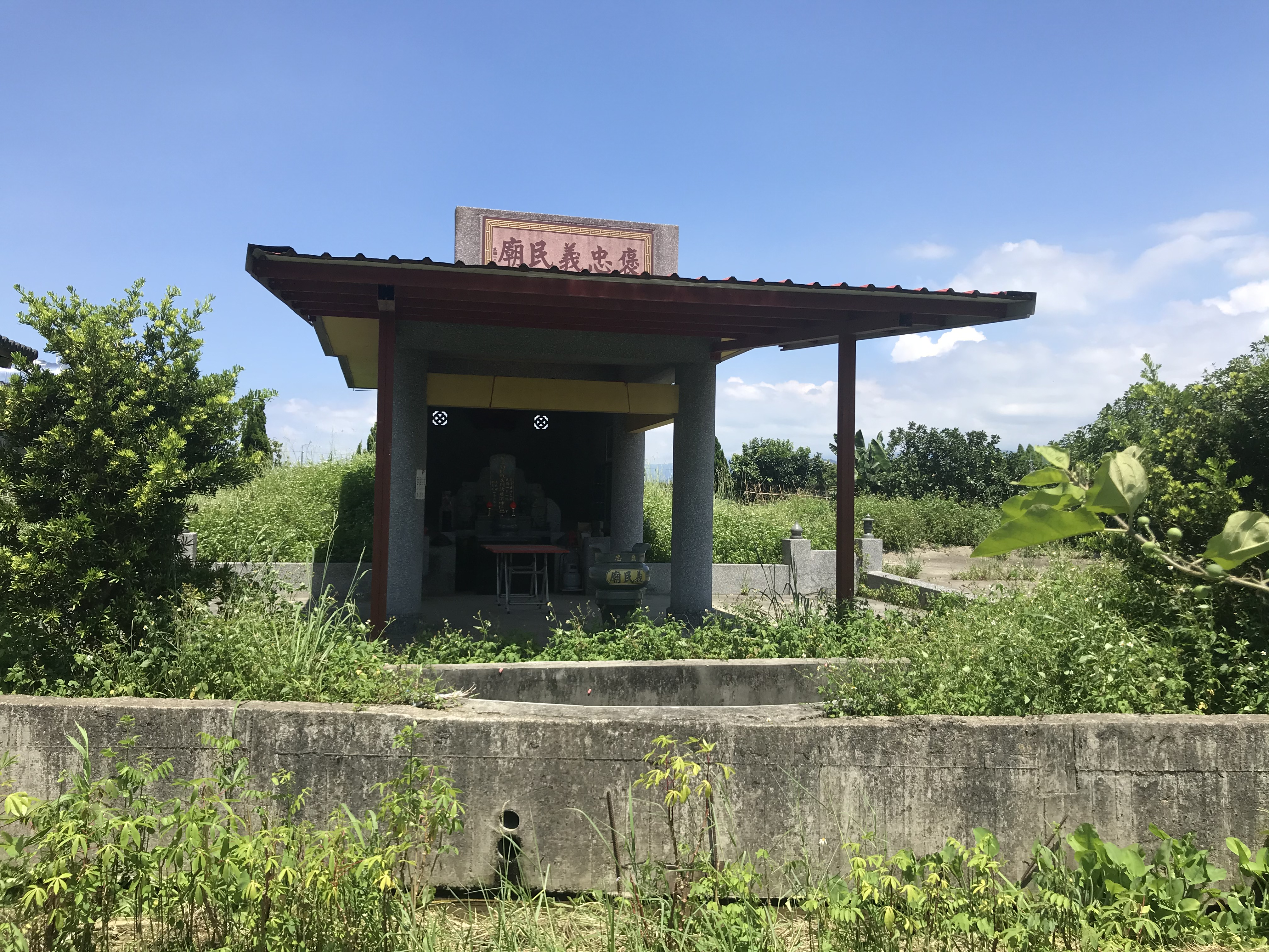 中文（台灣）: 改名褒忠義民廟的盤營古墓